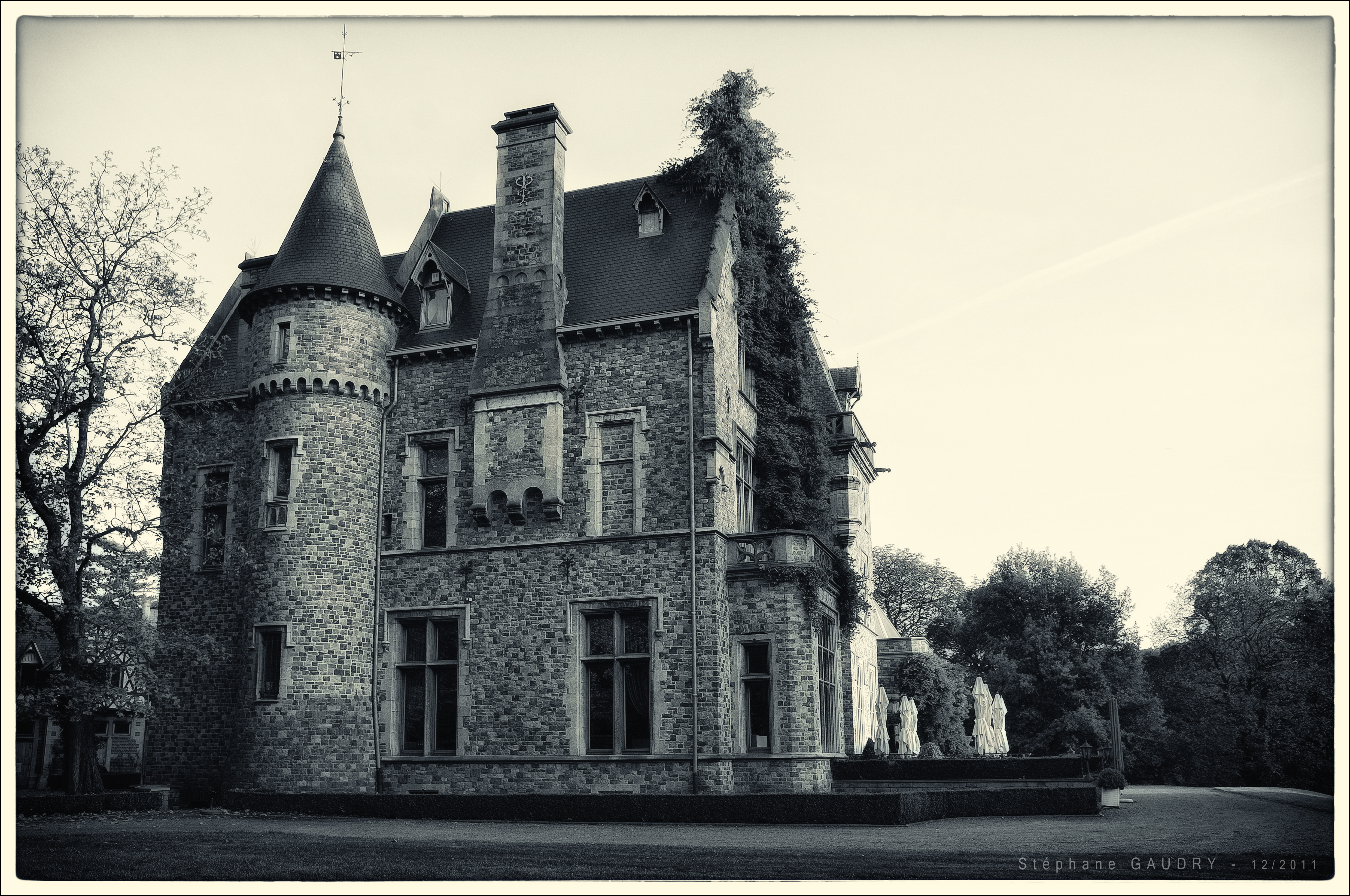 Historique : Les eaux pures de la Vesdre et l’absence de toute contrainte corporatiste avaient attiré de nombreux artisans dans la région de Verviers au XVIII siècle. Peu avant la Révolution française, les manufactures cédèrent progressivement la place à des fabriques plus importantes et les nouveaux capitaines d’industrie cessèrent de faire travailler à domicile les petites mains de Hodimont, Ensival, Dison ou Eupen. Aussi le gros bourg de Verviers devint-il une cité considérable ou affluaient les ouviers des campagnes. En 1810, quatre-vingt-six fabricants verviétois occupaient au moins 25.000 personnes. Parallèlement la Belgique connaissait l’essor du machinisme dont le développement n’avait d’égal dans le monde que celui des grandes agglomérations industrielles du nord de l’Angleterre. En 1785 une famille d’origine rhénane, les Peltzer, vint s’installer dans bourdonnante vallée. Avec les Simonis et les Biolley, les Peltzer furent assez rapidement les rois de la cité lainière. Leur Château de la rue Grétry s’éleva dès 1895 dans un parc valonné qui occupait une situation agréable, loin des fumées et des miasmes des quartiers laborieux. A partir de 1938, à la mort de la veuve du constructeur, ce grand édifice néo-gothique, difficile à entretenir et à chauffer connut des phases de silence et fût même inhabité dès 1971. Aussi Georges Peltzer, par souci de préserver un témoin grandiose de l’histoire de sa famille et de celle du capitalisme wallon, accepta-t-il de se débarrasser du bien en 1993. Source : Guide Castella